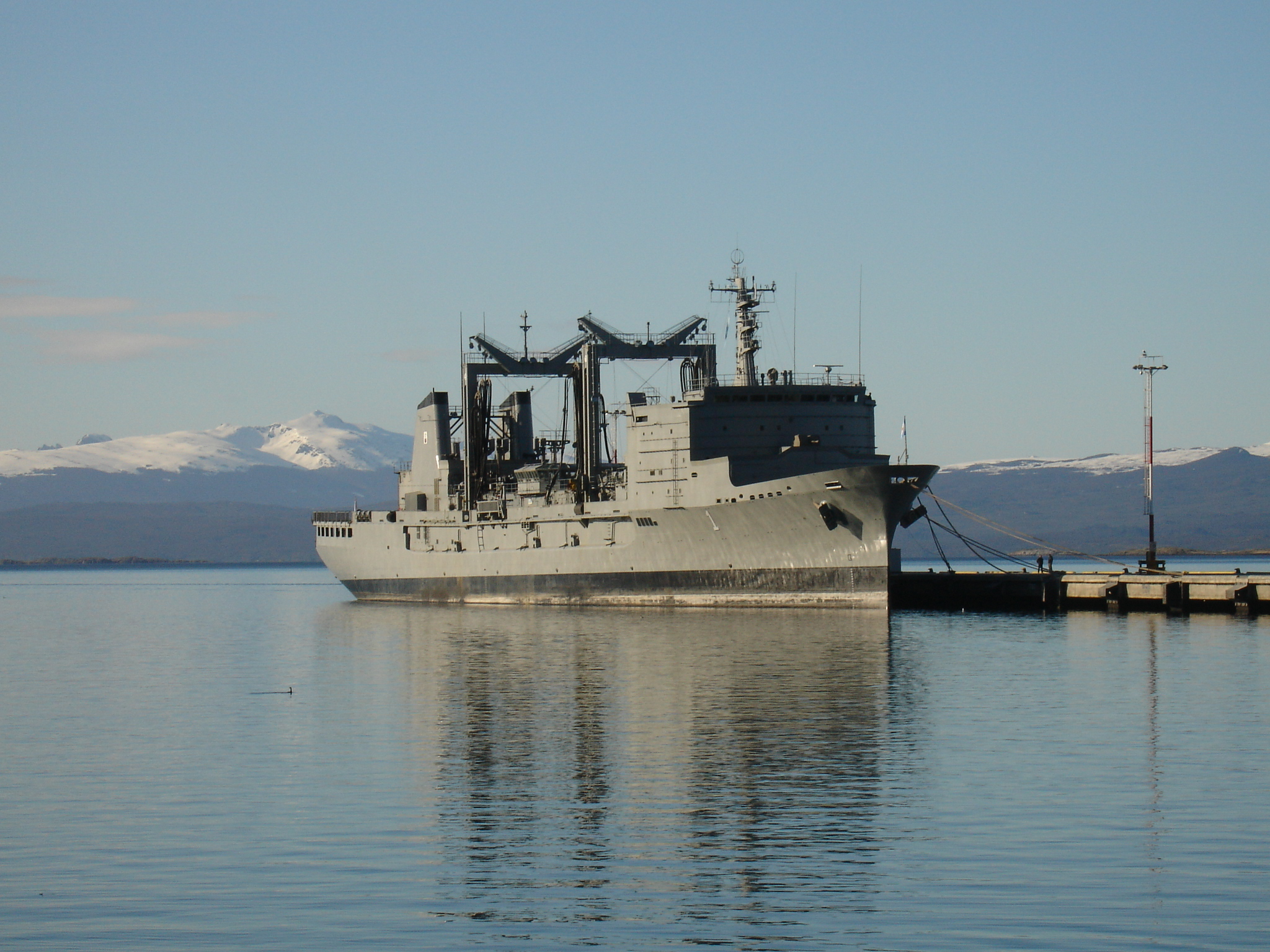 ARA Patagonia, antes Durance (A629). En el Puerto de la ciudad de Ushuaia, Provincia de Tierra del Fuego, Antártida e Islas del Atlántico Sur, Argentina. Septiembre de 2006.